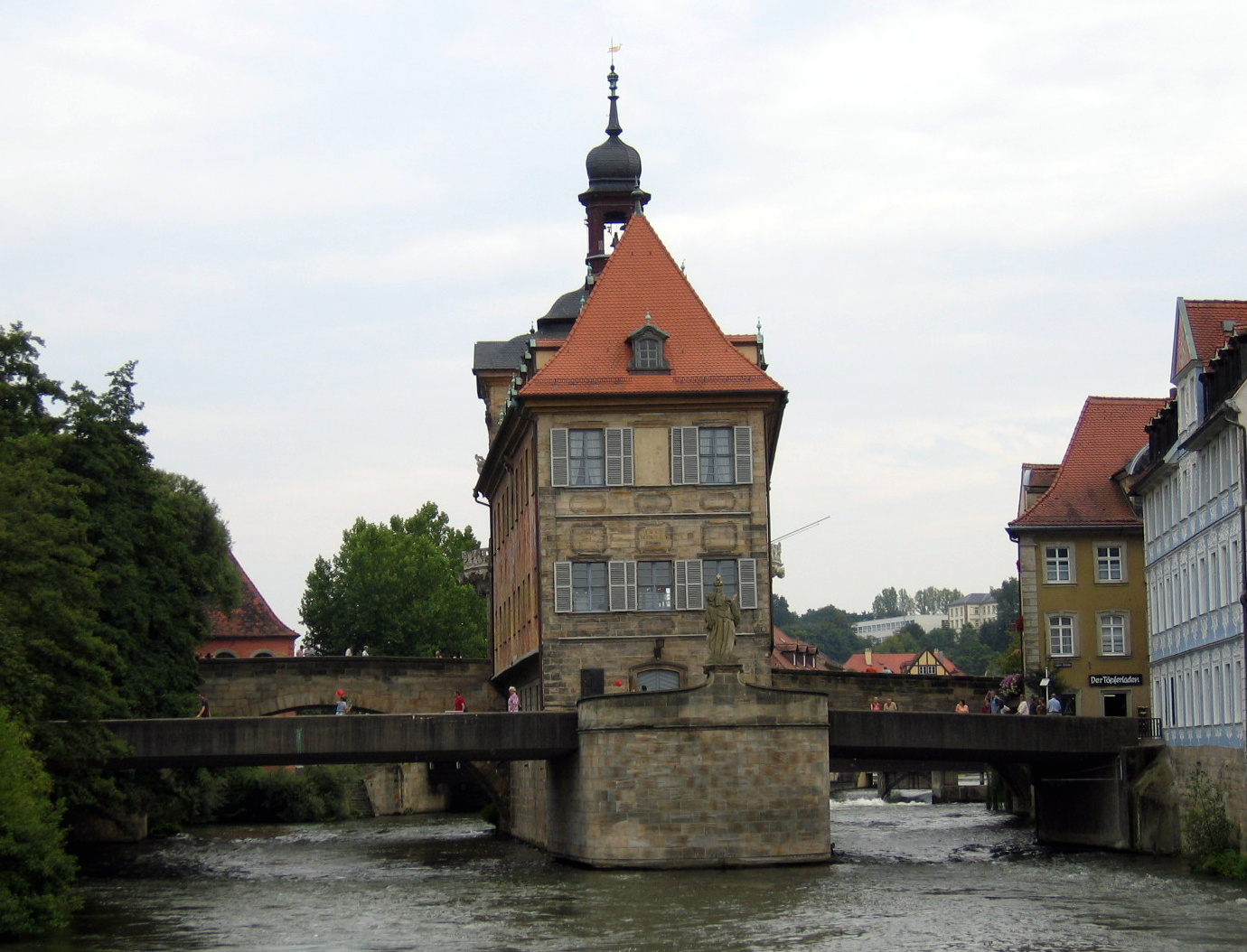 "Altes Rathaus", auf einer Insel im linken Regnitzarm (untere Brücke mit Statue Kaiserin Kunigunde) in Bamberg, Deutschland.